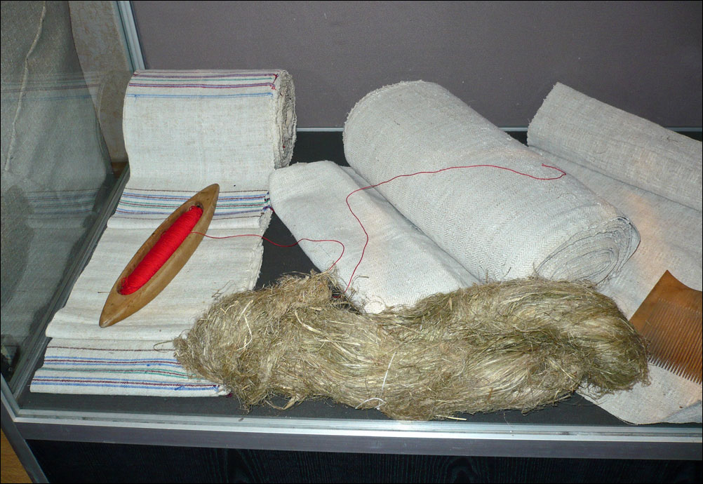 Кудель, ткацкий уток, домотканая материя. Белгородский музей народной культуры.